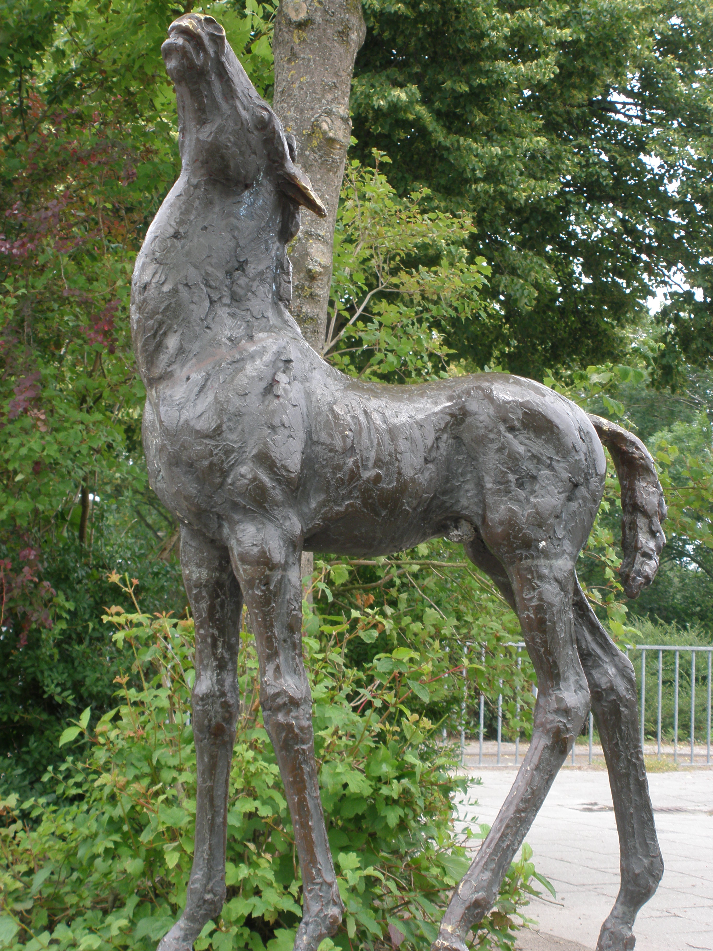 Bronzen beeld van Gabriel Sterk: Paardje.